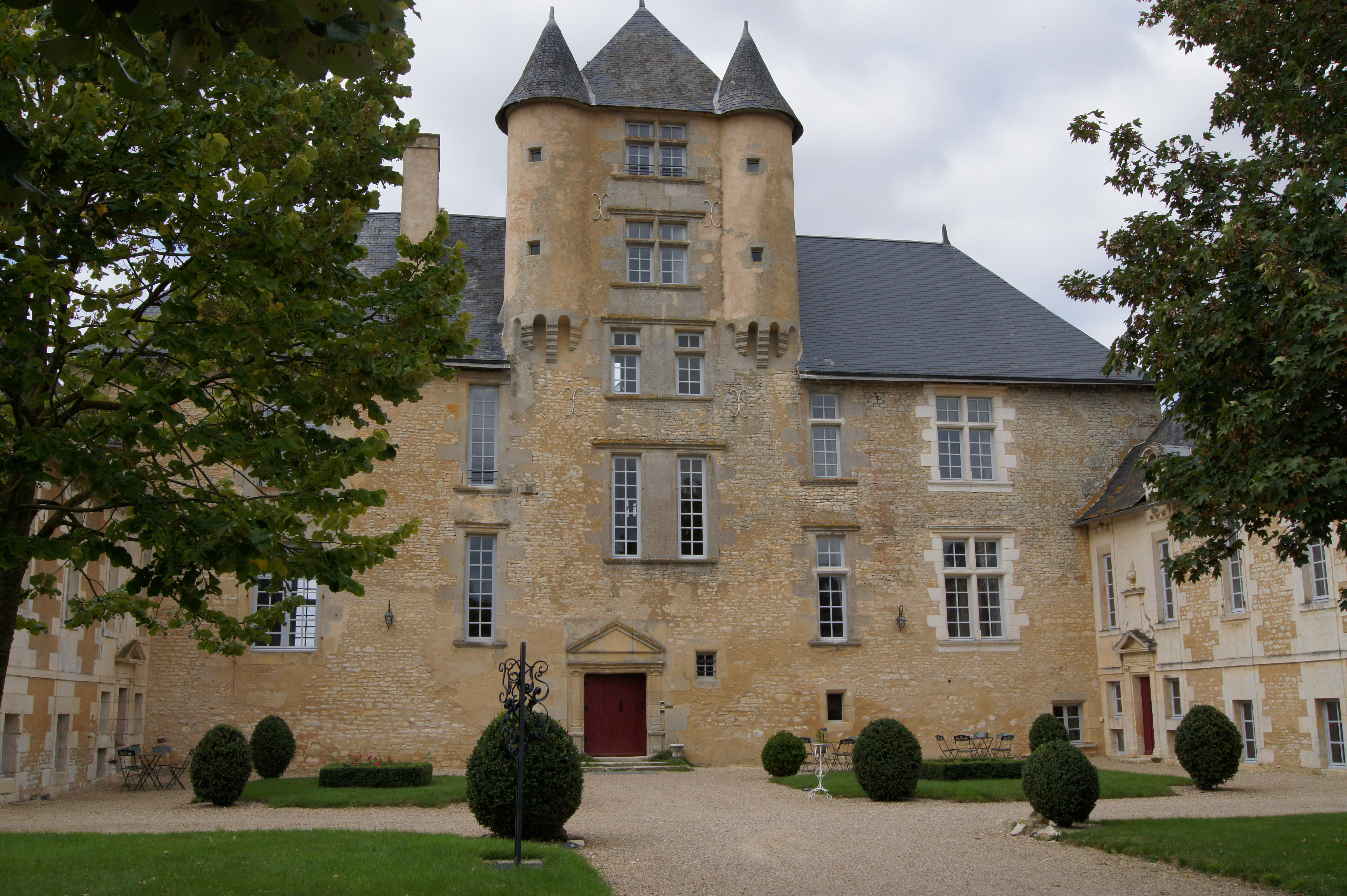 Façade du château d'Avanton